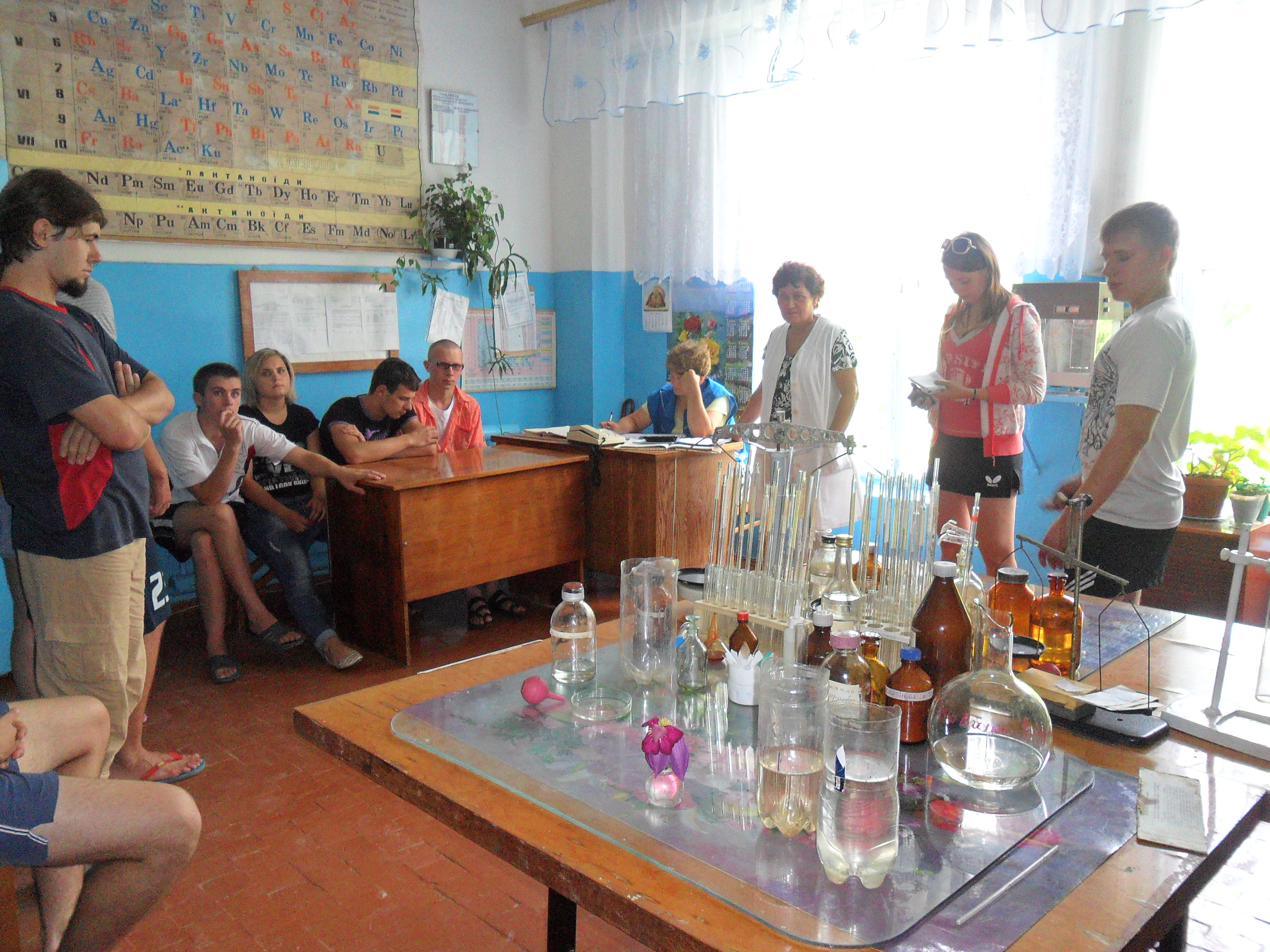 Богуславський гідролого-гідрохімічний стаціонар на р. Рось Київського національного університету імені Тараса Шевченка. Студенти 2-го курсу кафедри гідрології та гідроекології географічного факультету КНУ ім. Т. Шевченка на польовій гідрохімічній практиці на р.Рось на кафедральному стаціонарі в м. Богуславі Київської області. В гідрохімічній лабораторії - під час наукової екскурсії на водопровідну станцію м.Богуслава (влітку 2011 р.).